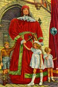 Kinneke Baba (Geraardsbergen)